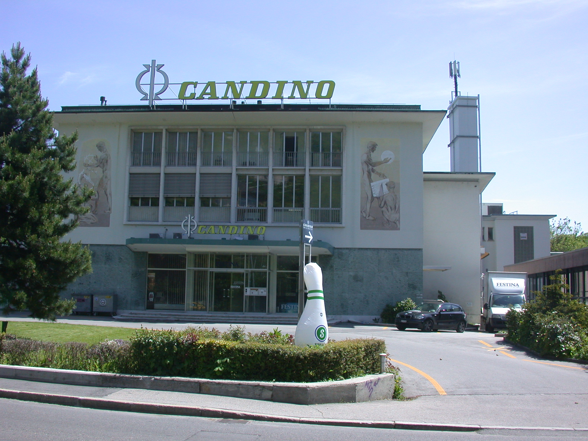 Das Candino-Werk in Biel/Bienne.